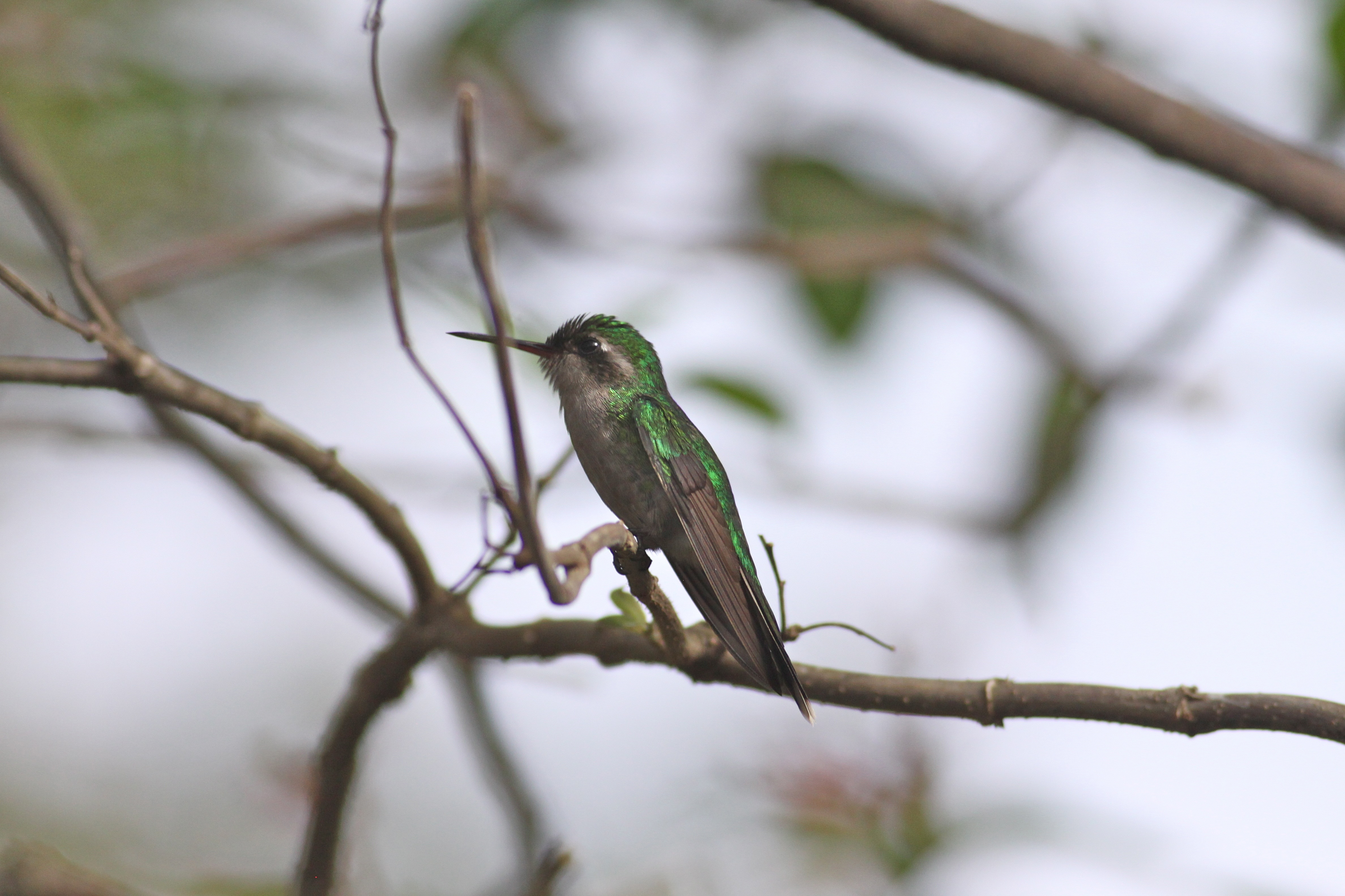 A Cozumel endemic.